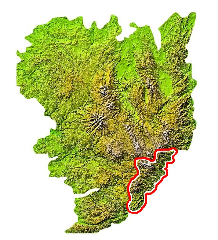 Situation des Cévennes sur la carte du Massif central